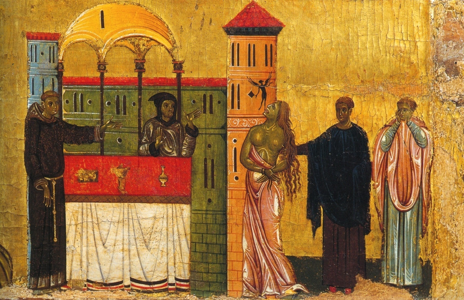 detail